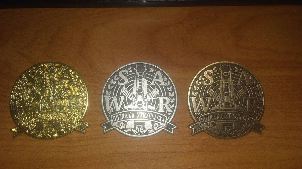 Odznaki Strzeleckie "WSAR / Wielkopolskie Stowarzyszenie Aktywnych Rezerwistów" (Złota, srebrna, brązowa)